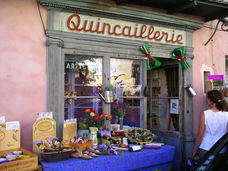 'n Tipiese winkel in Sault, Vaucluse